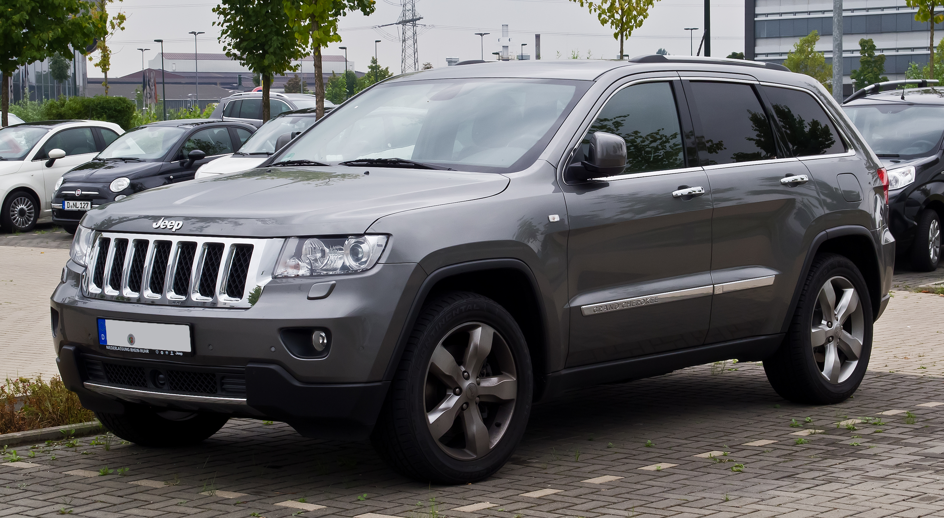 Jeep Grand Cherokee 3.0 CRD Overland (WK)